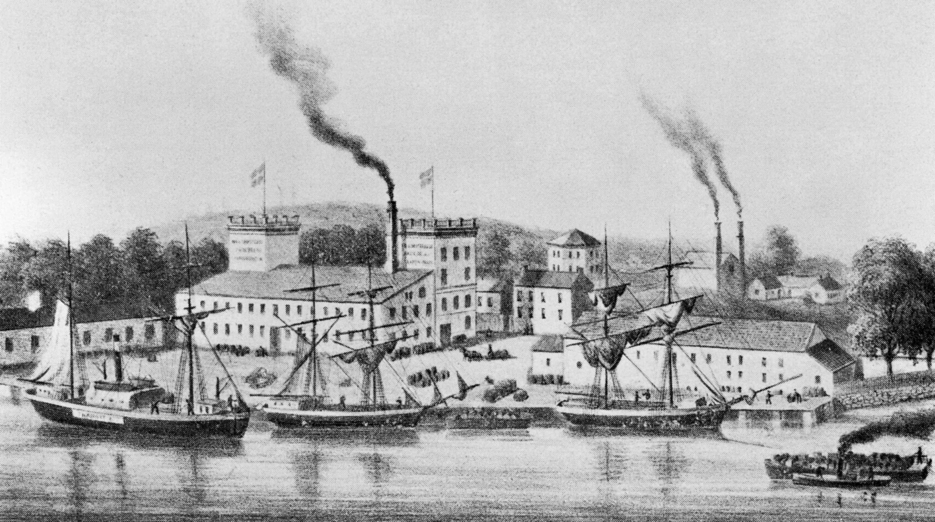 Spritfabriken på Reimersholme år 1872